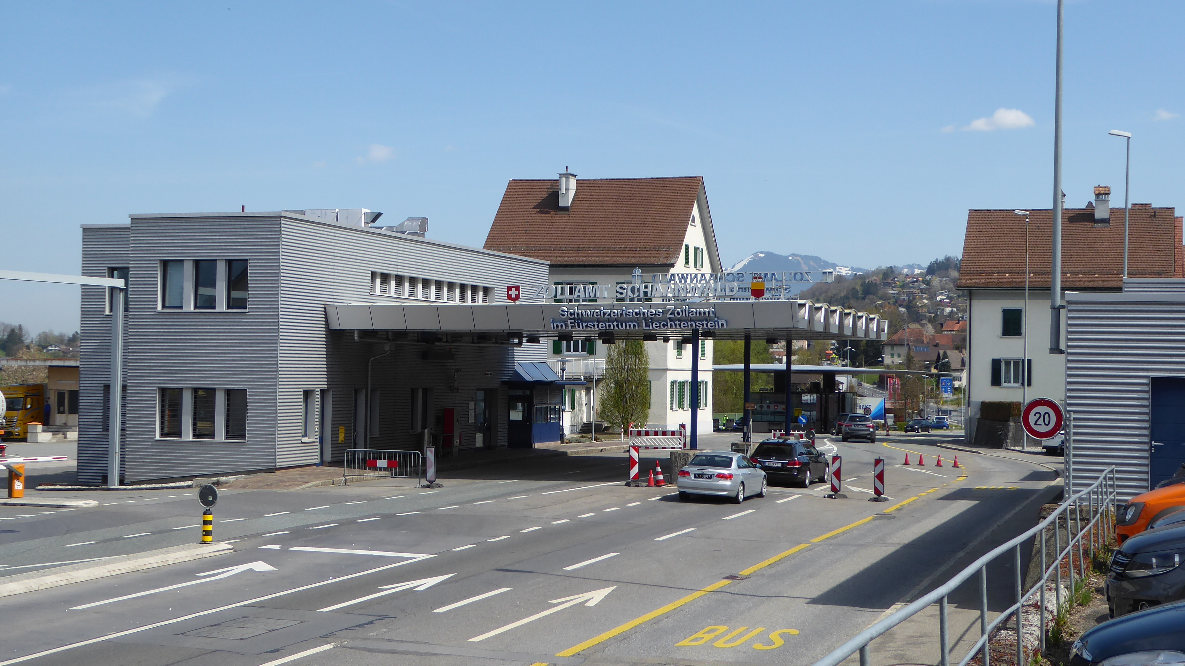 Schweizerisches Zollamt Schaanwald in Liechtenstein